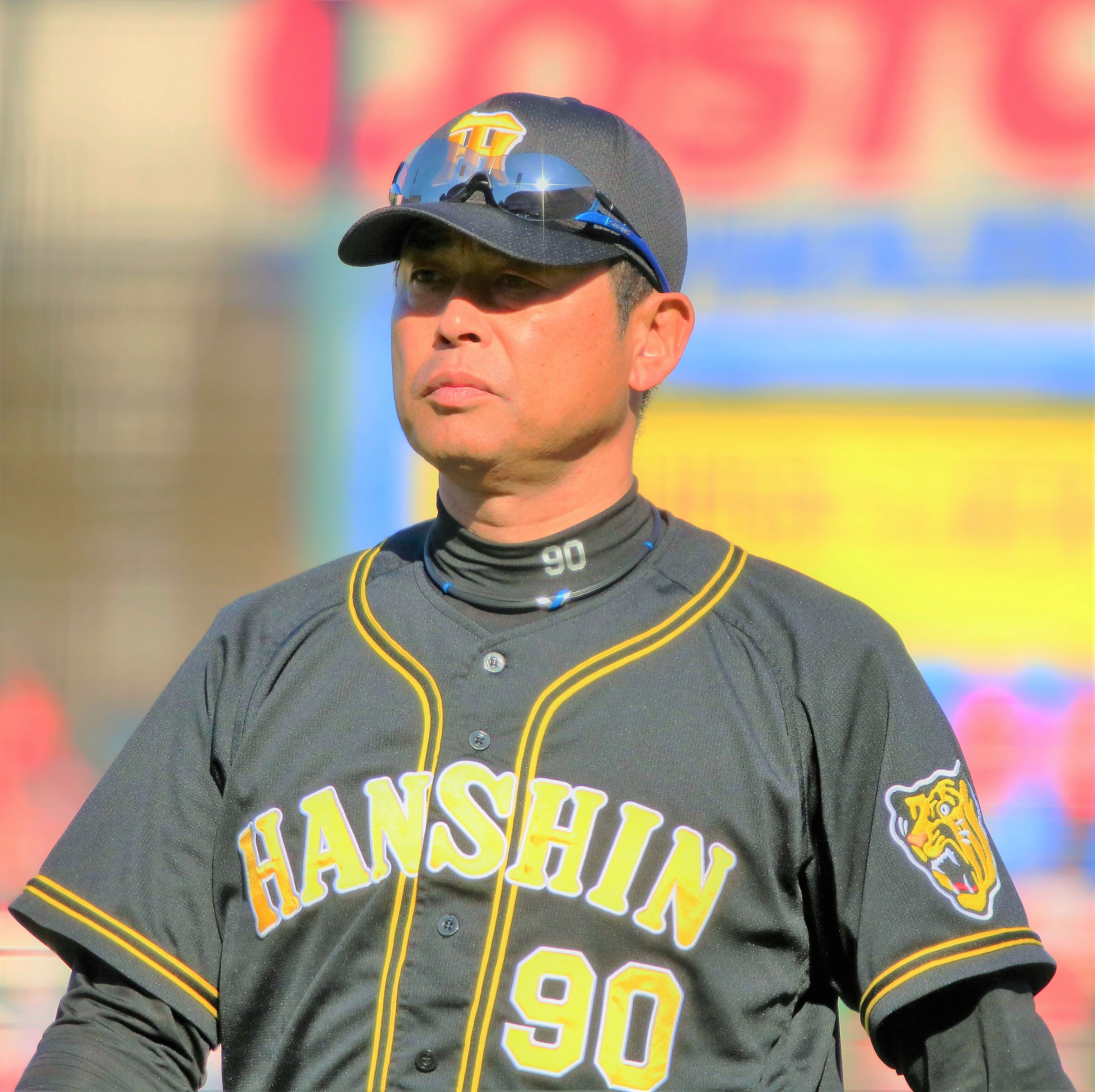 2018年5月12日 マツダスタジアム